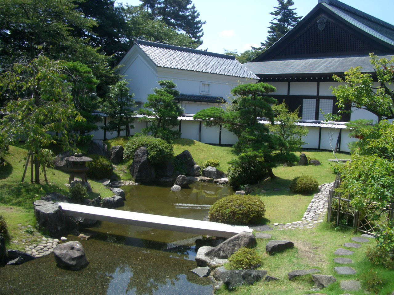 復元庭園